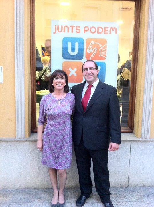 Carles Choví i Ana Calatayd inauguren la seu d'UxV en Carcaixent.